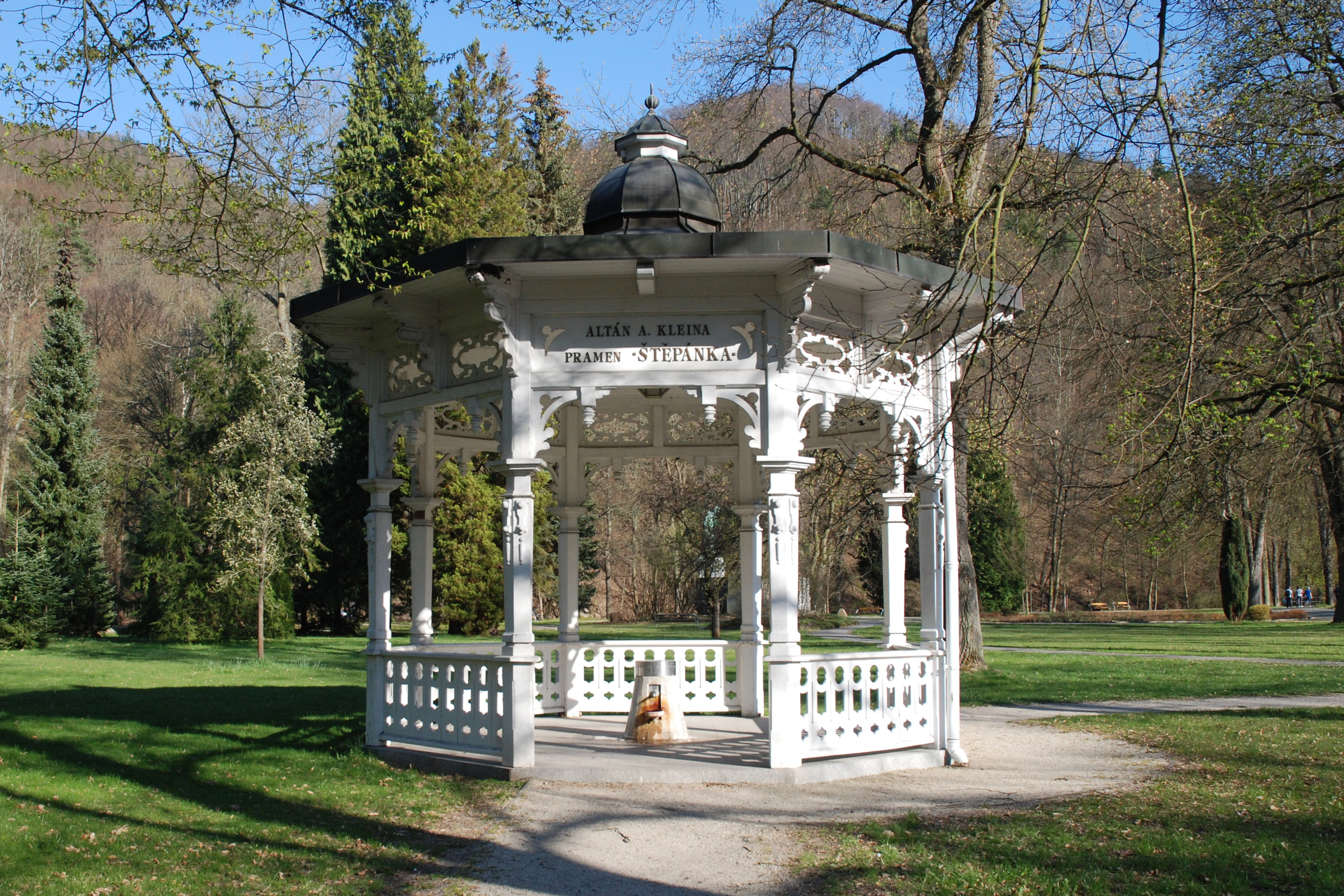 Altán Aloise Kleina pramene Štěpánka v parku před parkhotelem Richmond